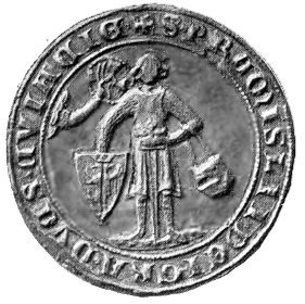 Przemysław Inowrocławski seal